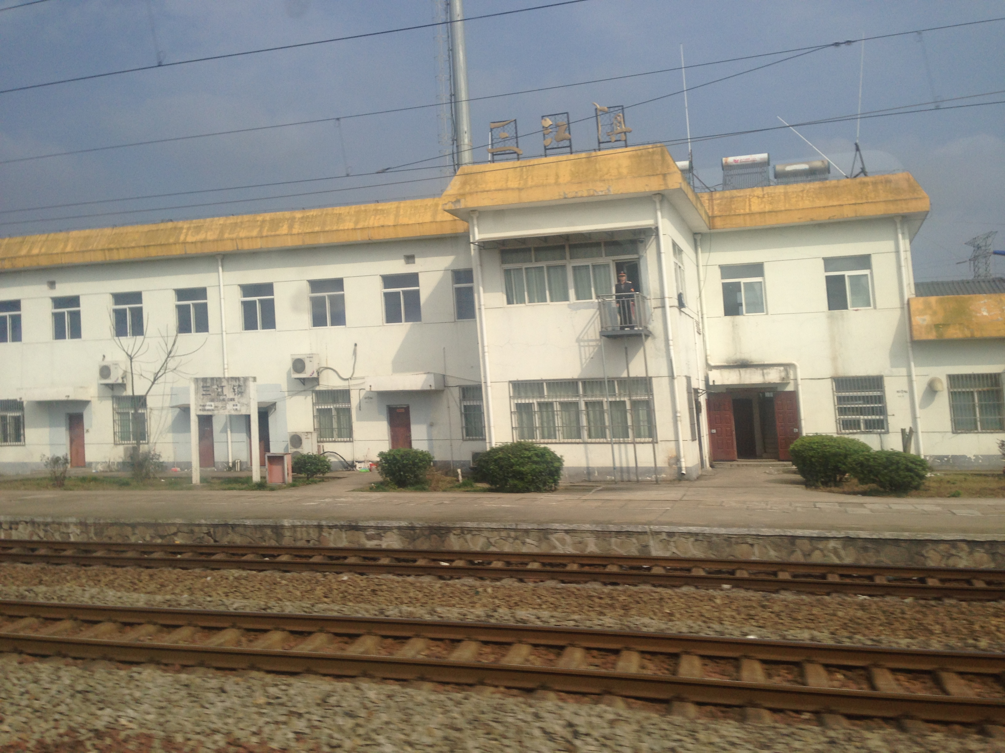 三江镇站 字数